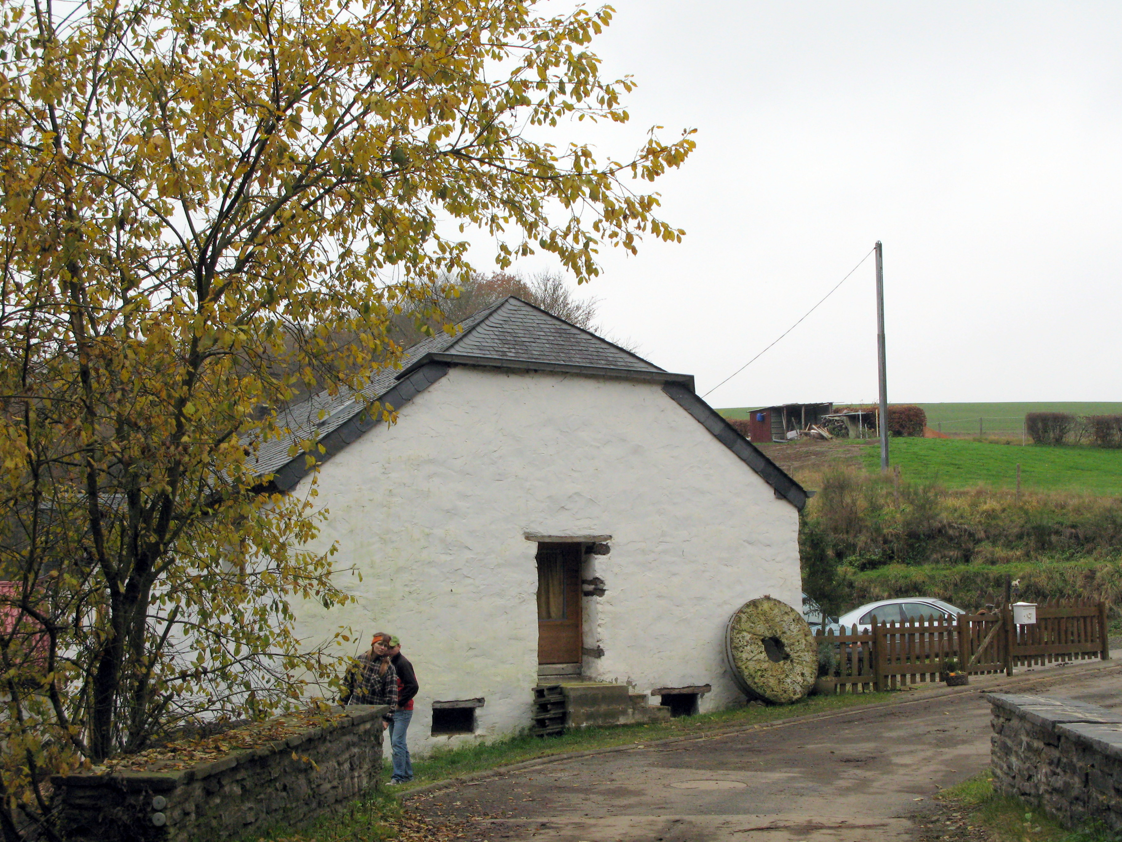 D'Kéiermillen